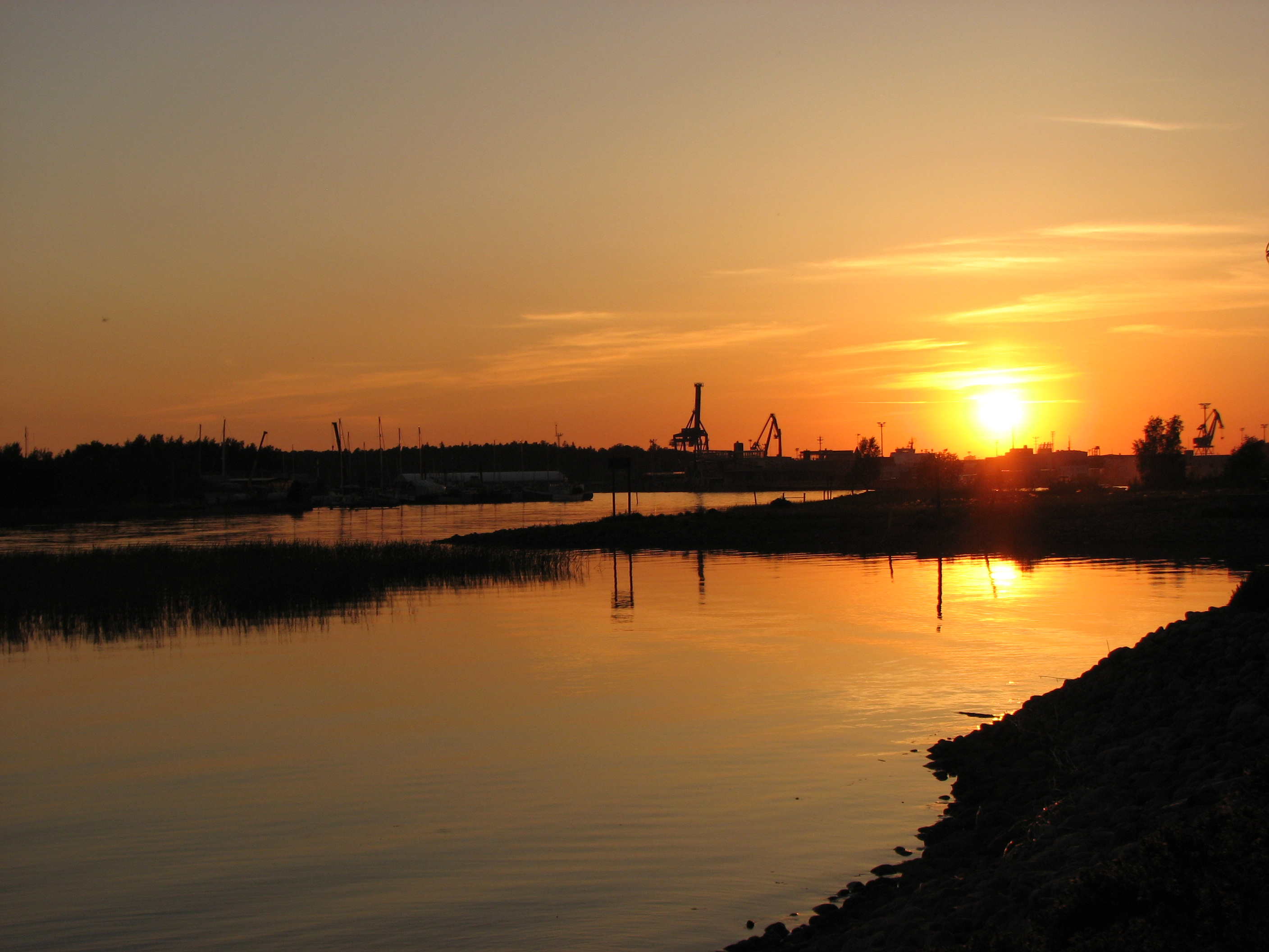 Sunset in Majakkaranta, Turku, Finland